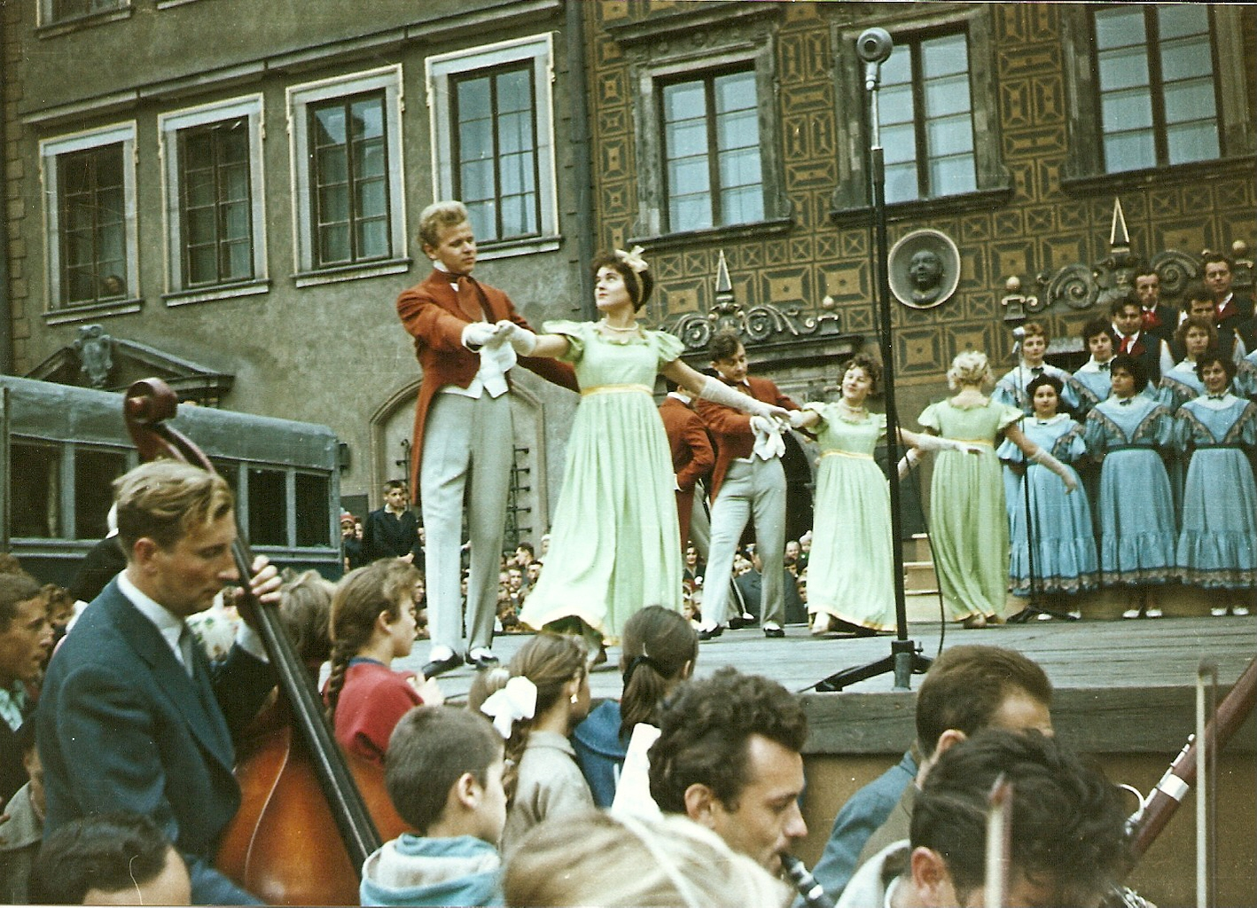 Starówka 1960 – Warszawa, Rynek Starego Miasta – Polonez w wykonaniu baletu: prowadzą Elżbieta Góra i Zenon Kubas, za nimi Barbara Bartel i Henryk Bednarski